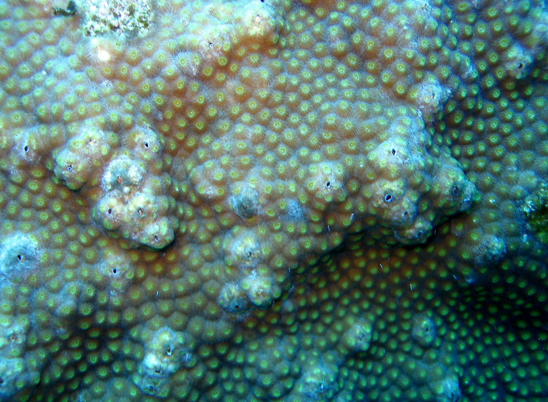 Orbicella franksi (Montastraea franksi), con pólipos abiertos. Flower Garden Banks